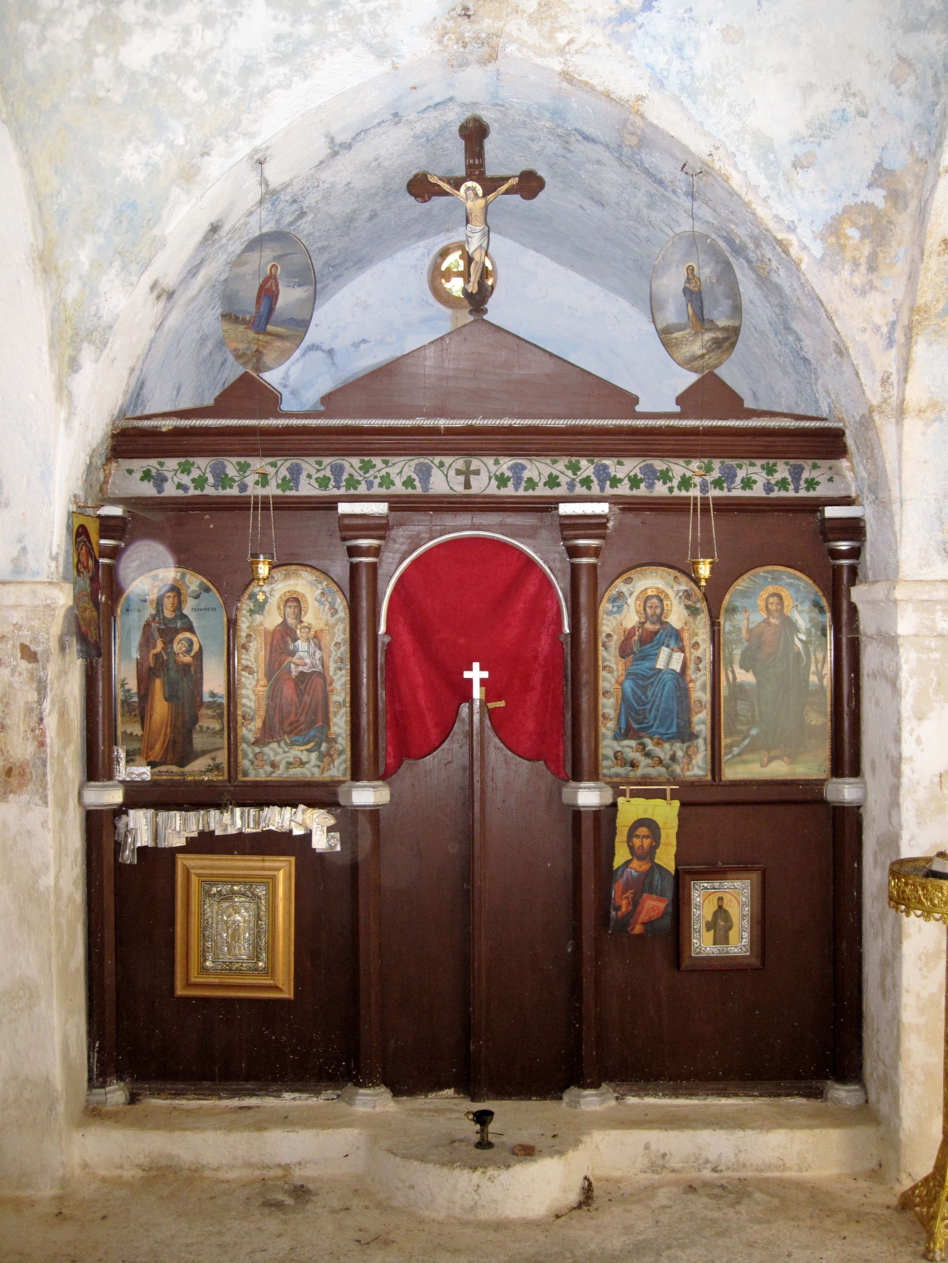 Altar der Kapelle Agia Paraskevi (Αγία Παρασκευή) im Amari-Becken, Gemeinde Syvritos, Präfektur Rethymno, Kreta, Griechenland